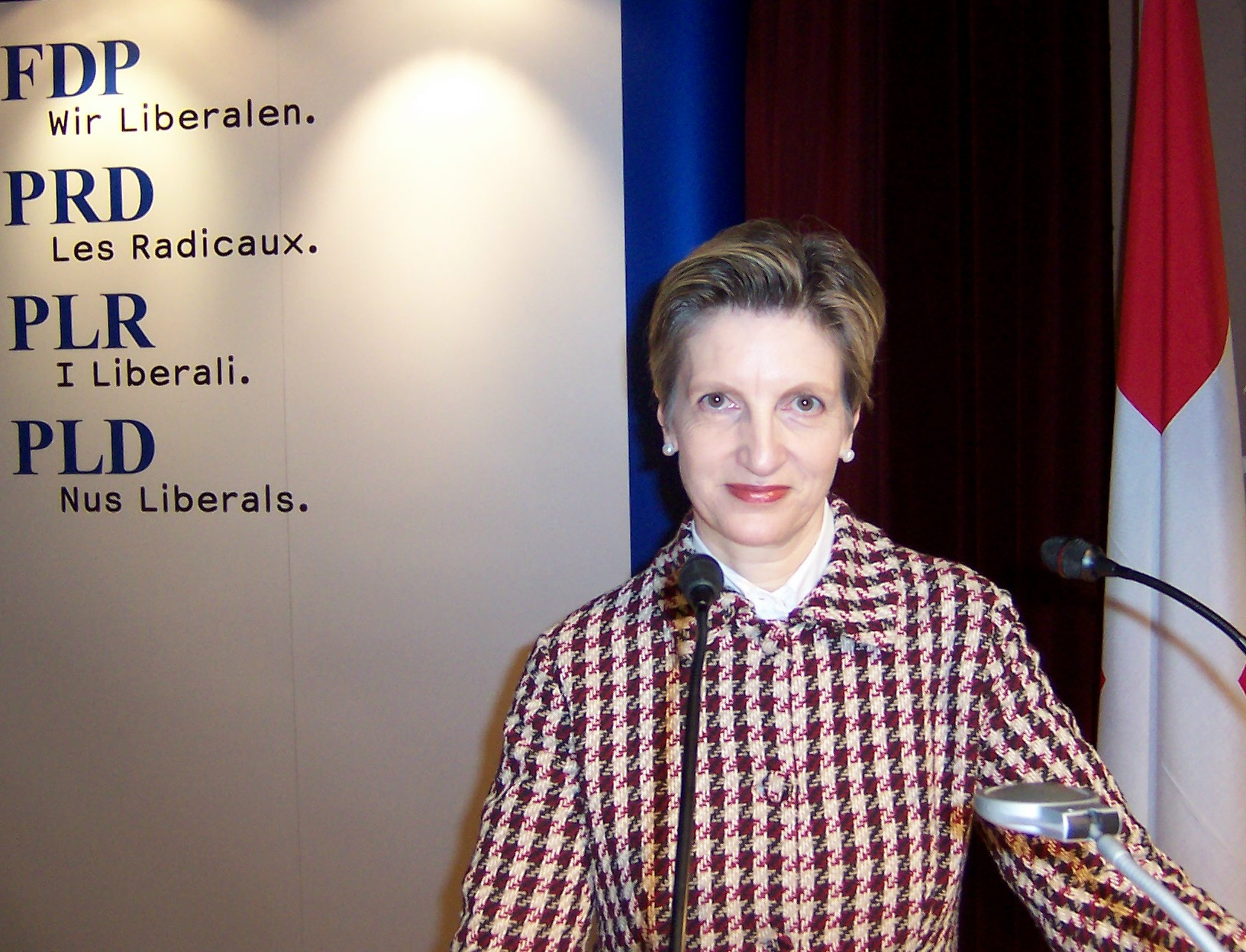 Gabi Huber, Nationalrätin (FDP/UR), Präsidentin der FDP/LP-Fraktion der Schweizerischen Bundesversammlung